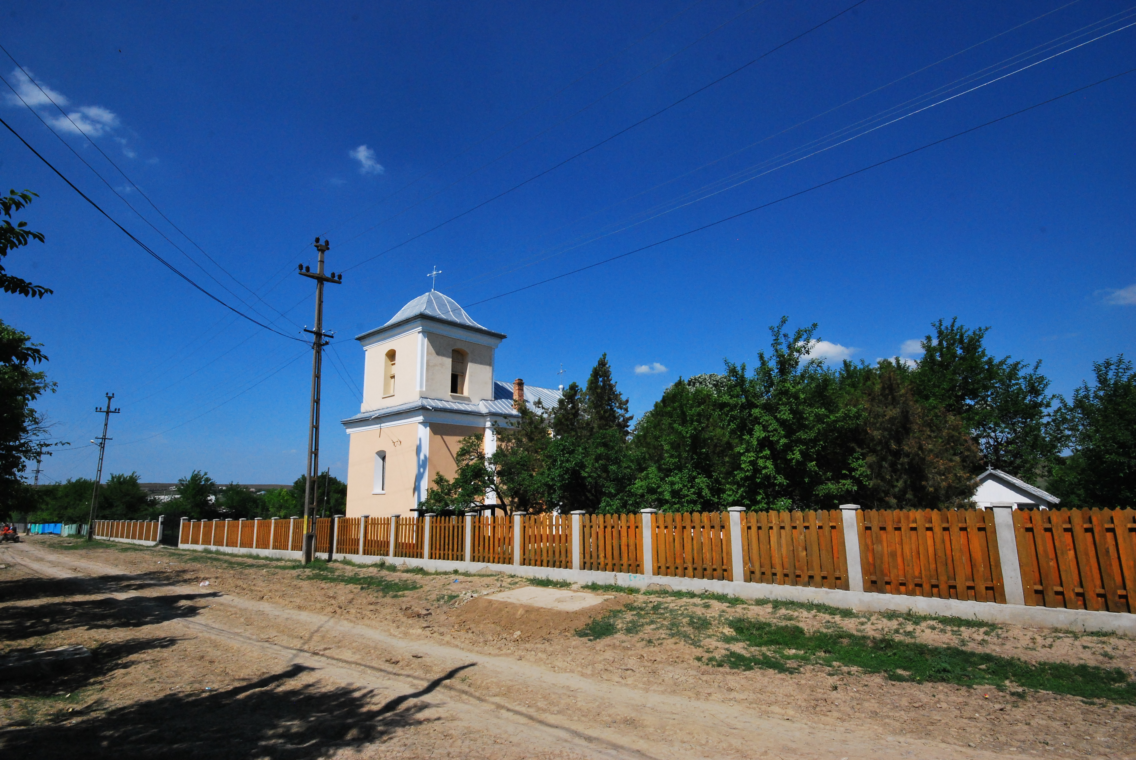 Biserica "Sf. Apostoli"